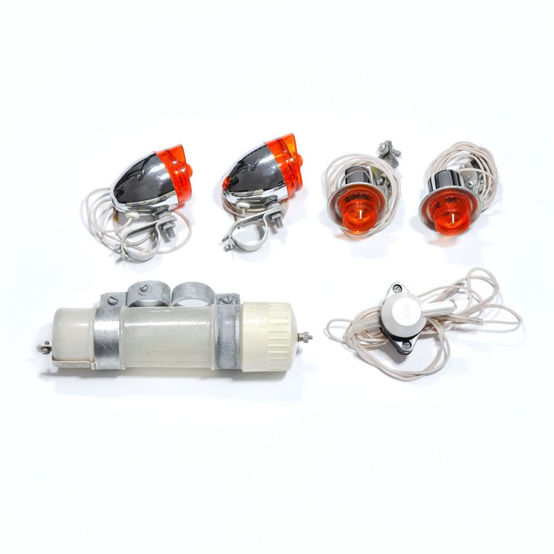 Kierunkowskazy rowerowe, 1967 rok. Ówczesna nazwa producenta: A-15.